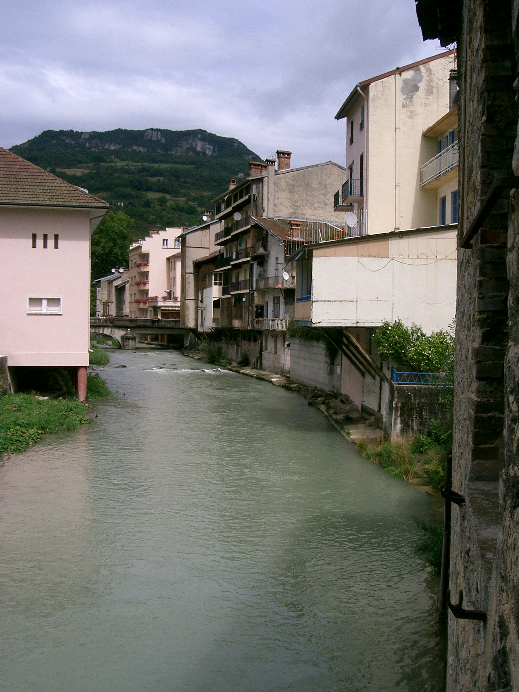 la rivière l'Albarine à Tenay dans l'Ain